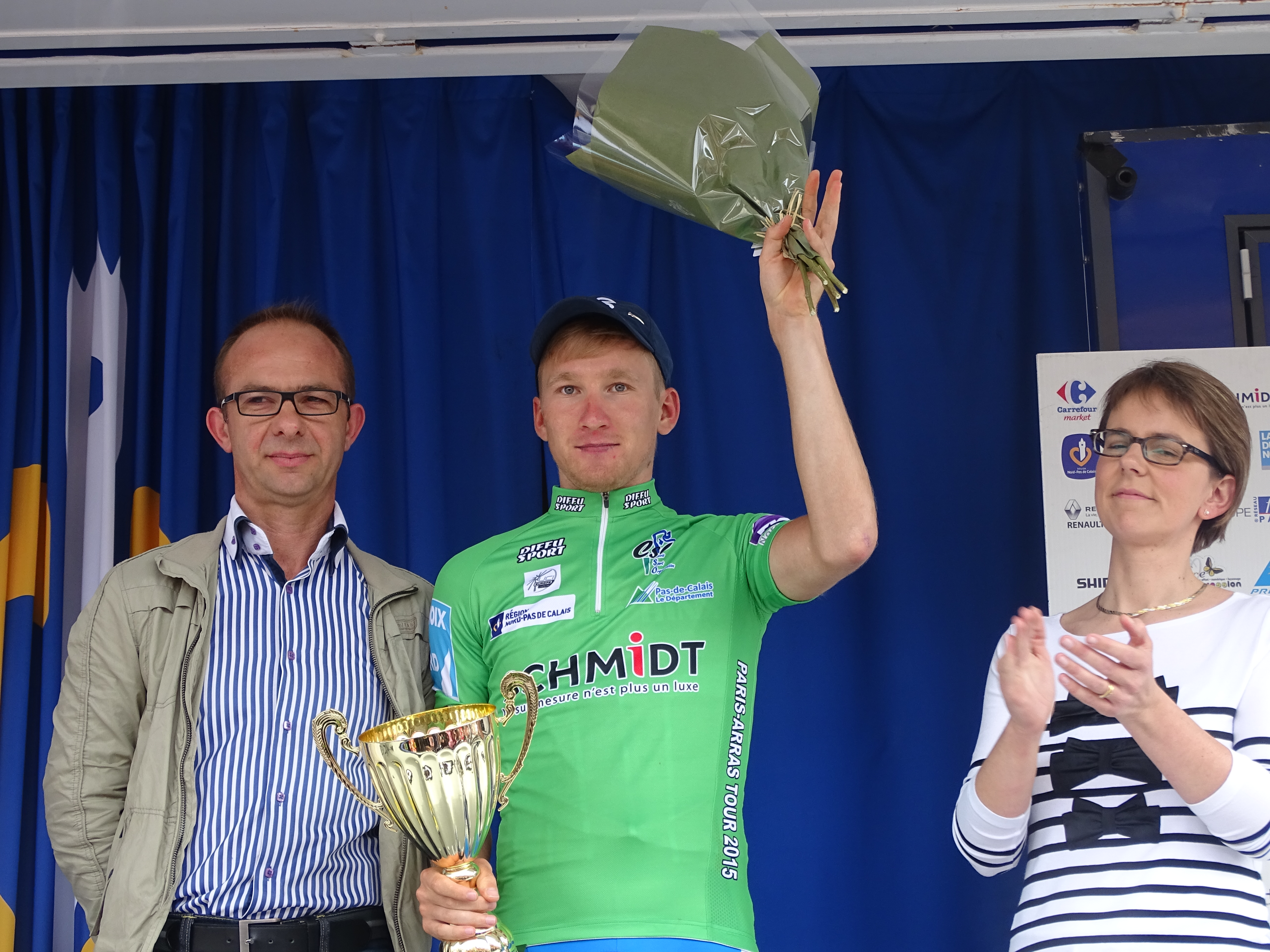 Reportage réalisé le dimanche 24 mai 2015 à l'occasion du départ et de l'arrivée de la troisième étape du Paris-Arras Tour 2015 à Arras, Pas-de-Calais, Nord-Pas-de-Calais, France.